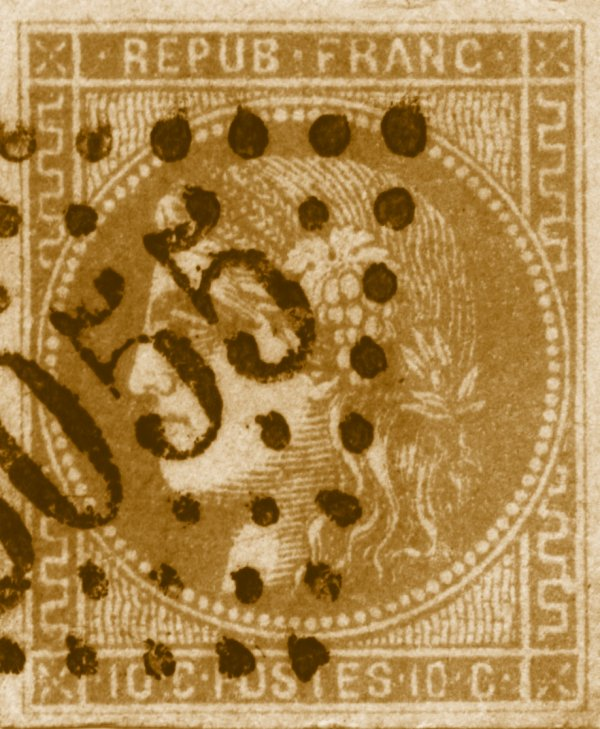 Timbre type Cérès, France, émission de Bordeaux, 1871.